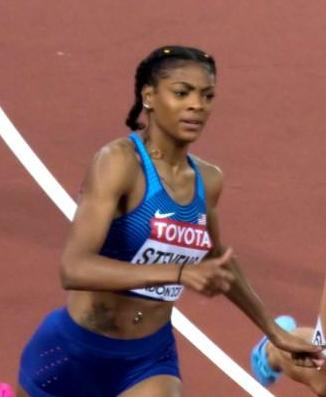 d7_32 200m dames finale